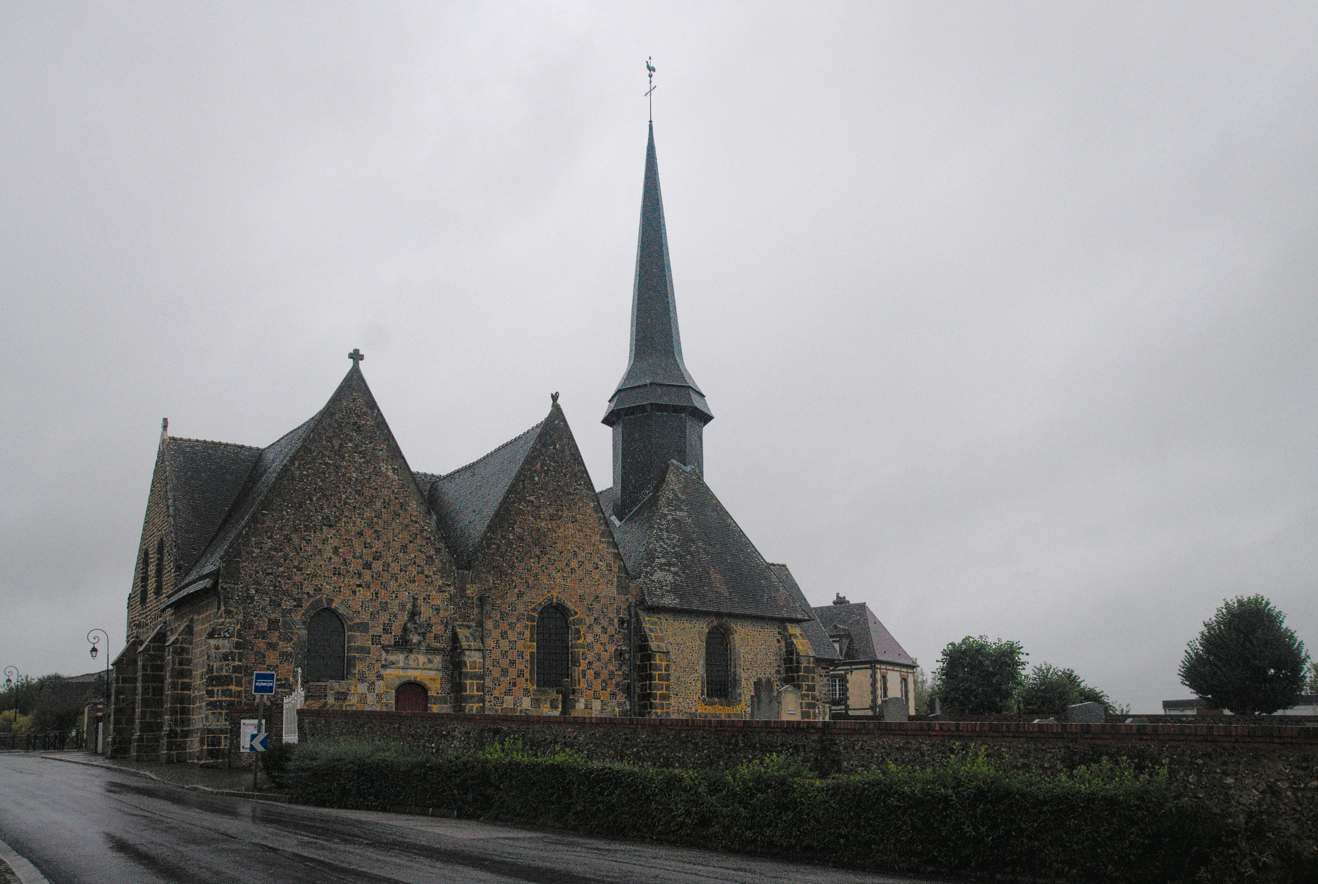 Église Saint-Pierre de Chéronvilliers